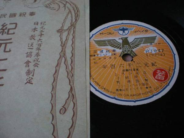 本人所有のレコード盤を撮影